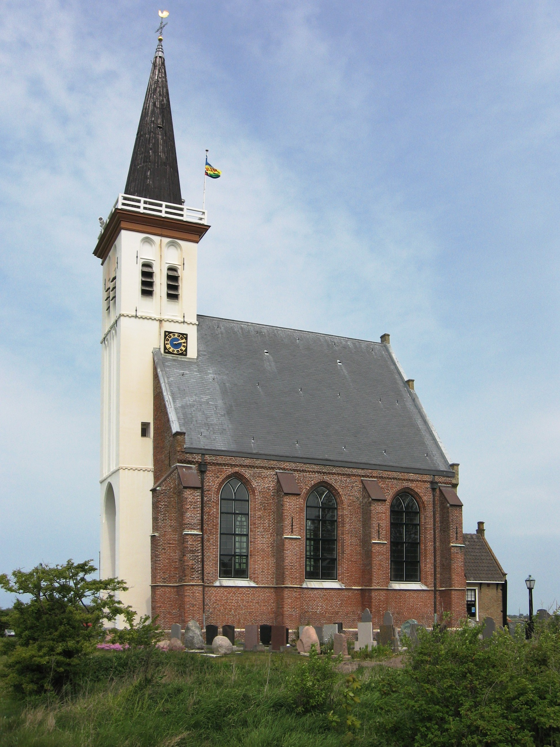 Den Hoorn - Hervormde Kerk, rijksmonument